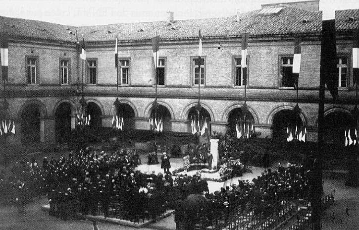 Inauguration du monument Laulanié, en présence du professeur Auguste Chauveau, faisant un discours, dans la cour d'honneur de l'ancienne école vétérinaire